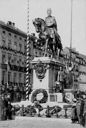 Kaiserdenkmal auf dem Obermarkt in Görlitz